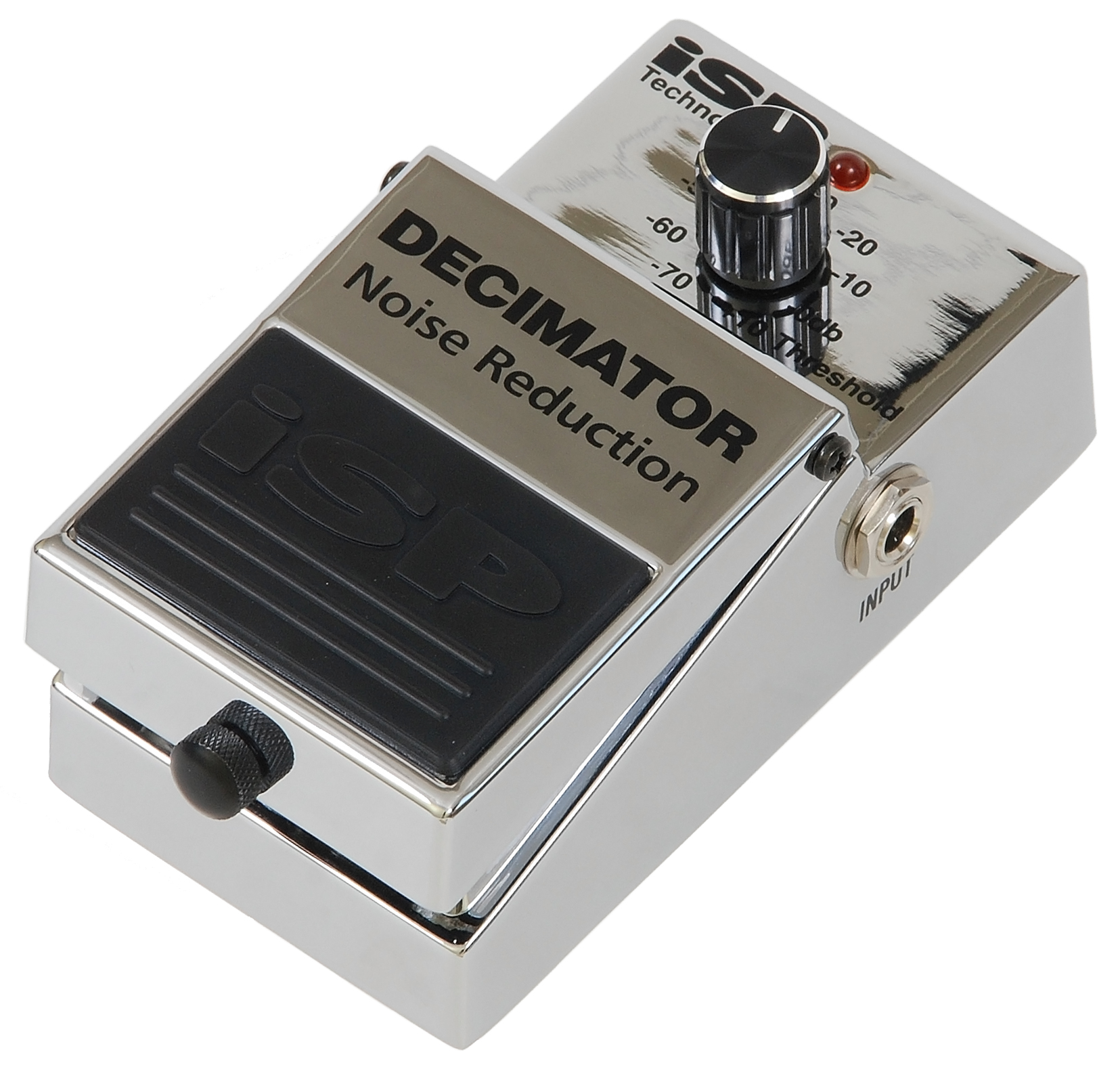 Efekt gitarowy, bramka szumów Decimator firmy ISP